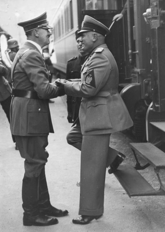 [Ankunft Mussolinis am 29.09.1938 in München] 12877-38